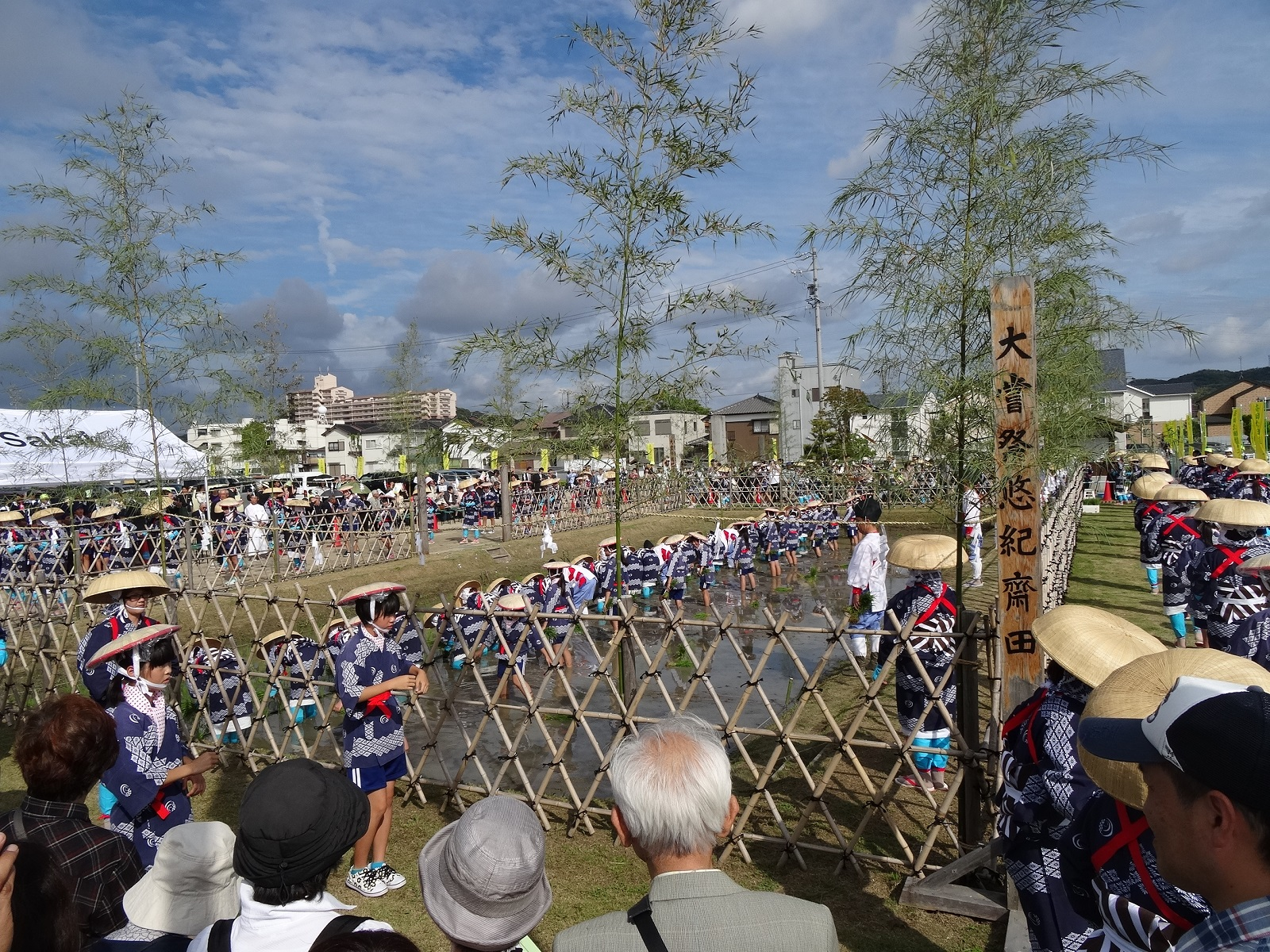 悠紀斎田お田植えまつり（岡崎市中島町）